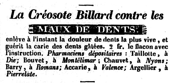 publicité extraite d'une exemplaire du "Journal de la Drôme" de 1839 en faveur d'une créosote (probablement créosote de goudron de bois) destinée à soigner les maux de dents ("La Créosote-Billard, spécifique breveté contre la carie et les maux de dents. Un prix a été décerné à M. Billard en récompense d'une si précieuse découverte" selon le Journal de l'Ain - 26 janvier 1835)